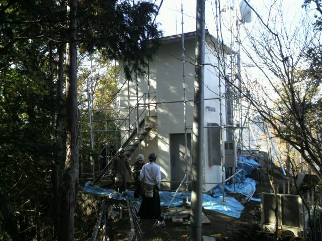 NHK日光足尾テレビ・FM中継局の全景